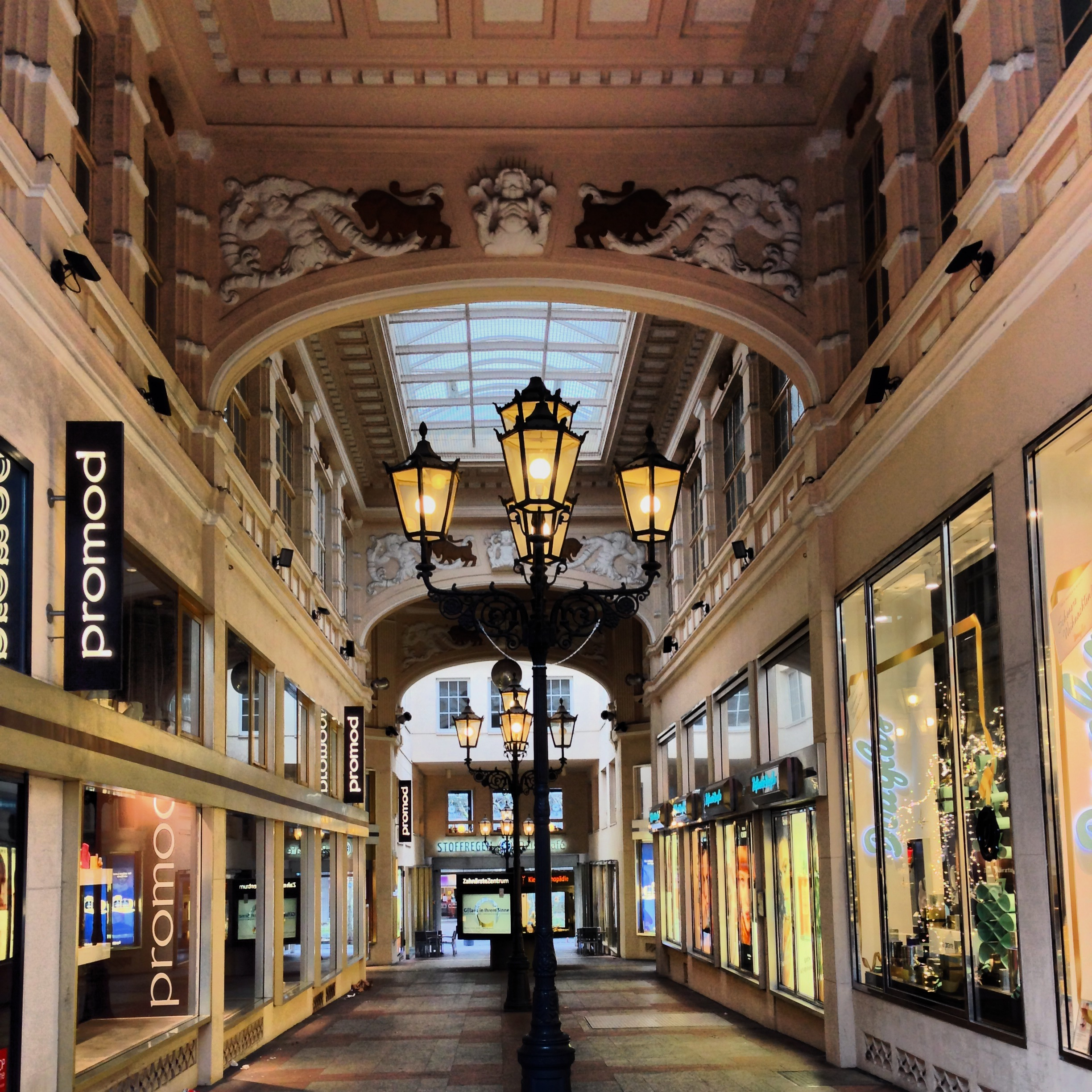 Krügerpassage im Krügerhaus